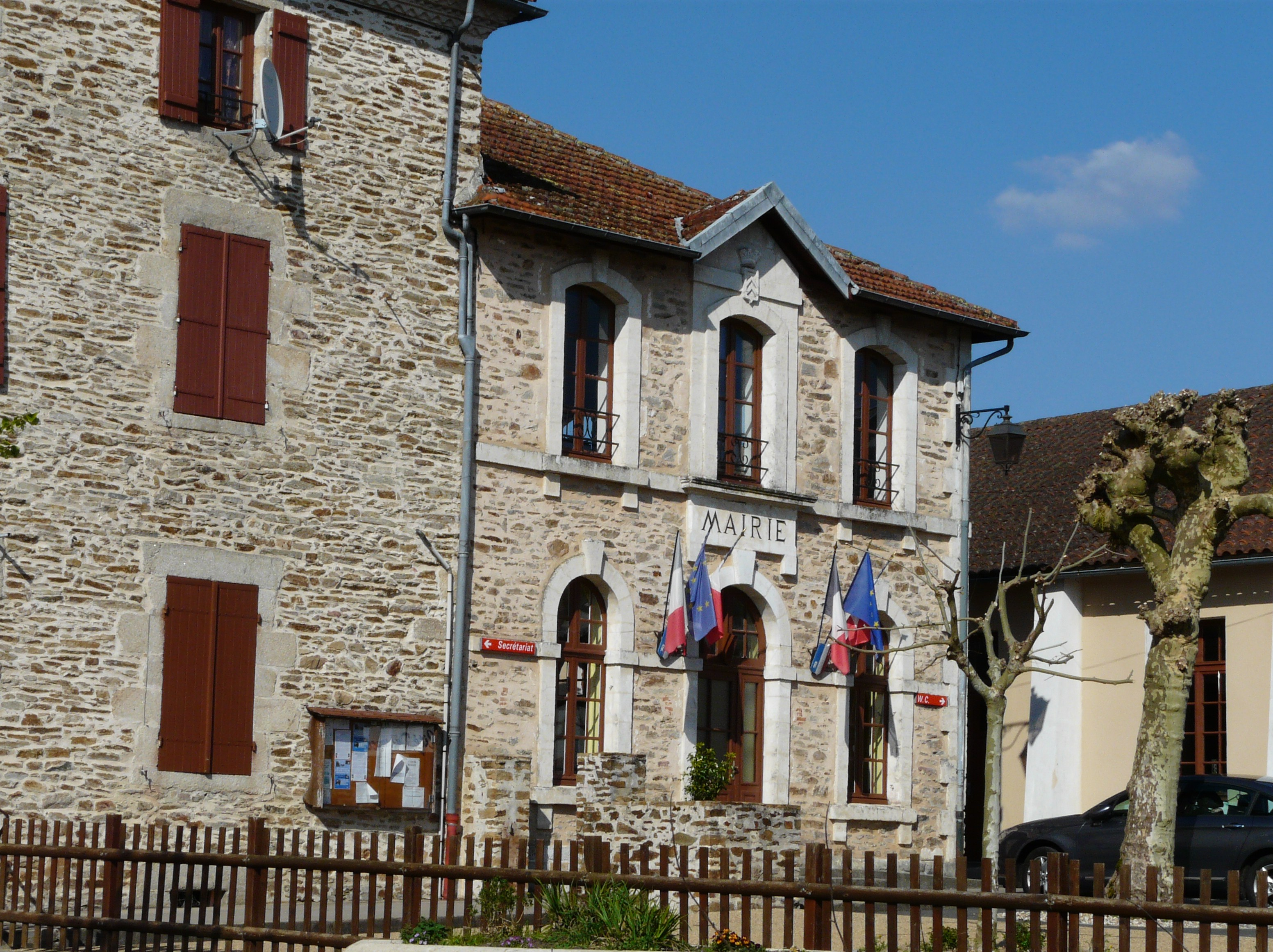 La mairie de Mialet, Dordogne, France.